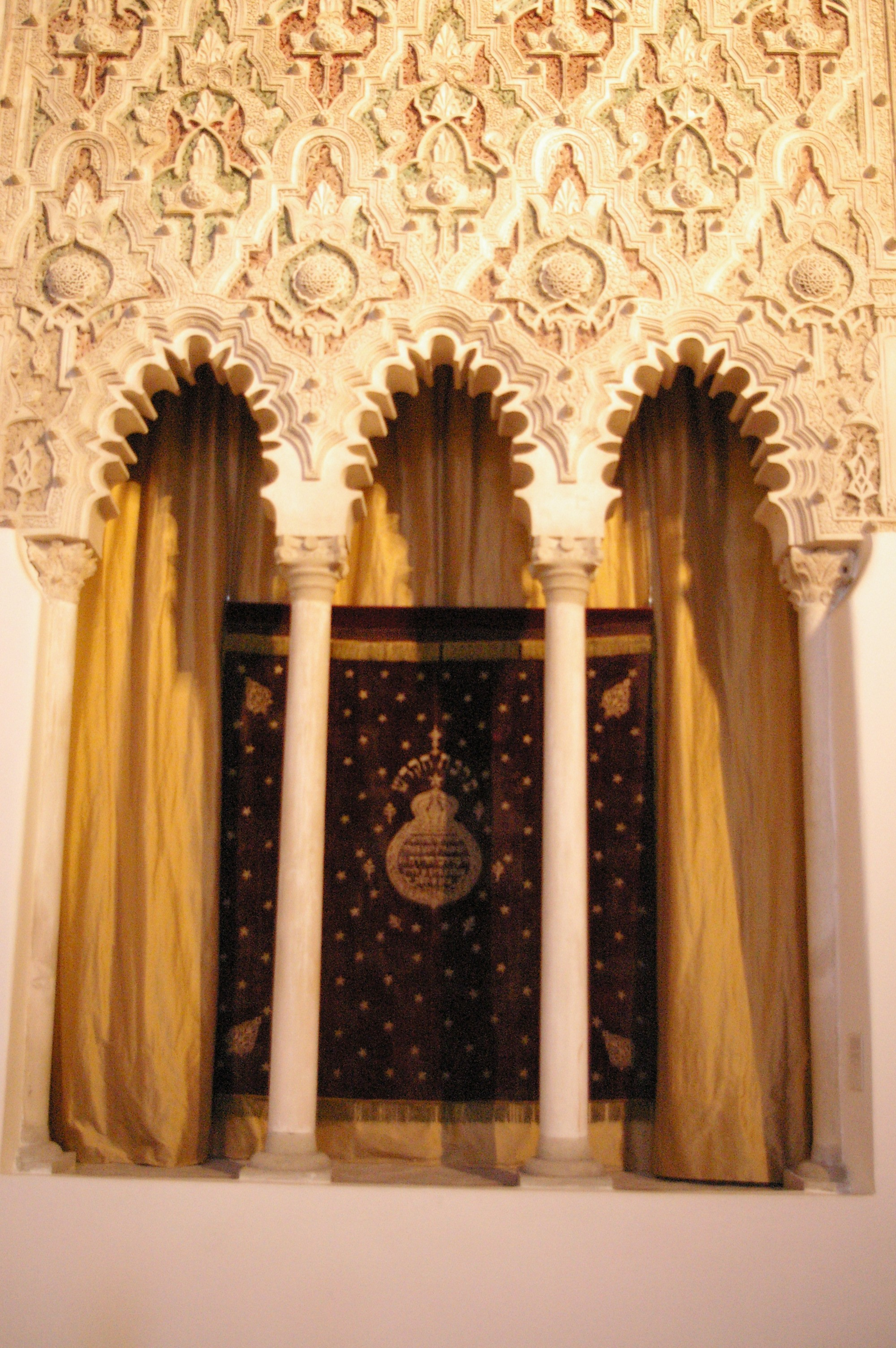 Aron Kodesh de la synagogue el Transito de Tolède